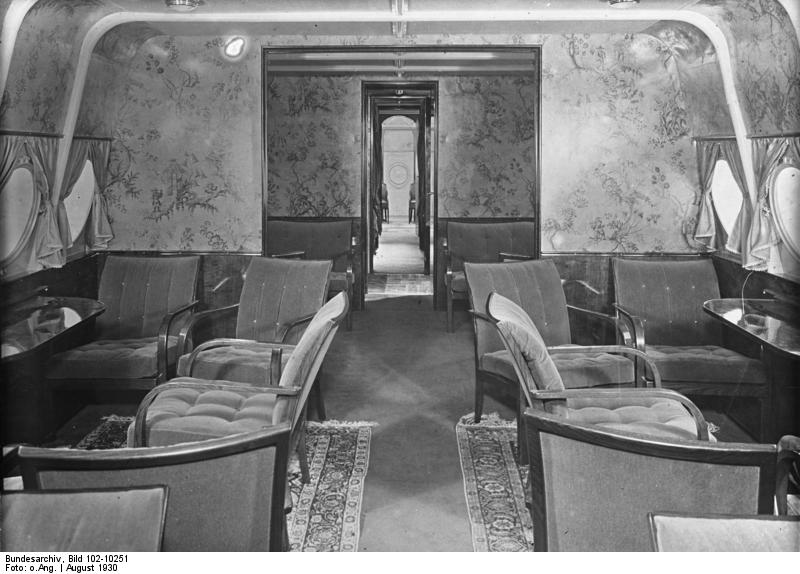 Das deutsche Riesenflugboot "Do X" rüstet für den Amerika-Flug ! Die ersten Probeflüge mit den neuen amerikanischen Curtis- Wright-Motoren sind vollendet. Blick in das Innere des mit allem Comfort ausgestatteten Riesen-Flugboots.